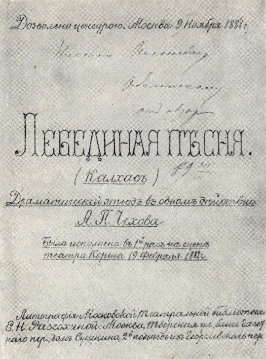 Лебединая песня (Калхас) литографированный оттиск 1888 г.